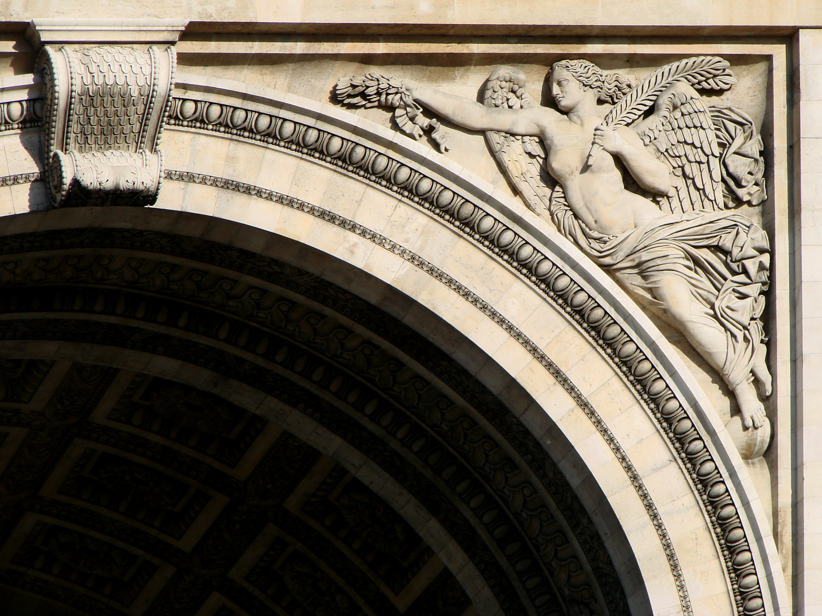 L'Arc de Triomphe à Paris, vu depuis l'Avenue de la Grande-Armée: une Victoire.